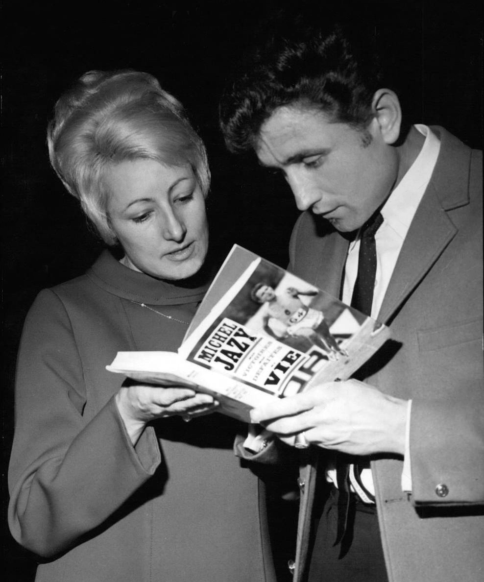 PRESS PHOTO MY VICTORIES, MY DEFEATS, MY LIFE AUTHOR MICHEL JAZY